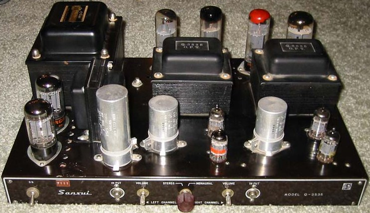 Amplificateur stéréo de puissance Q-3535 de 1958